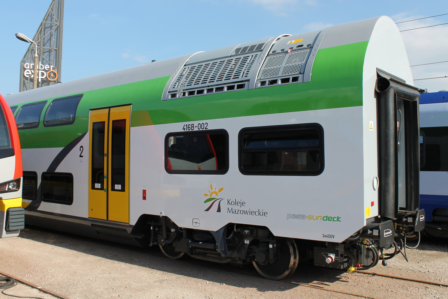 Środkowy wagon piętrowy Pesa Sundeck 416B-002 podczas targów Trako 2015. The making of this document was supported by Wikimedia Polska Association, within Wikigrant no. WG 2015-34.